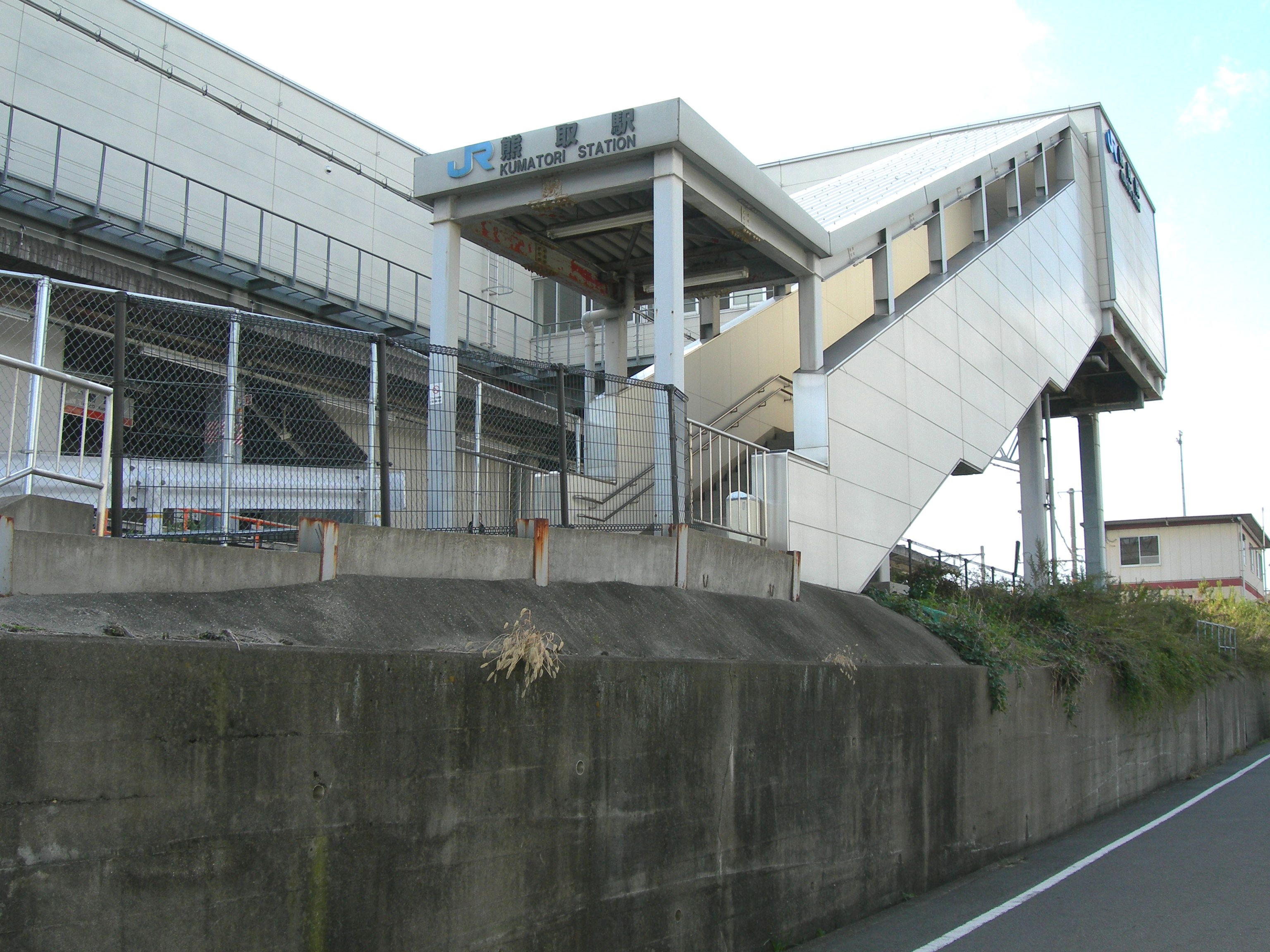 熊取駅西口